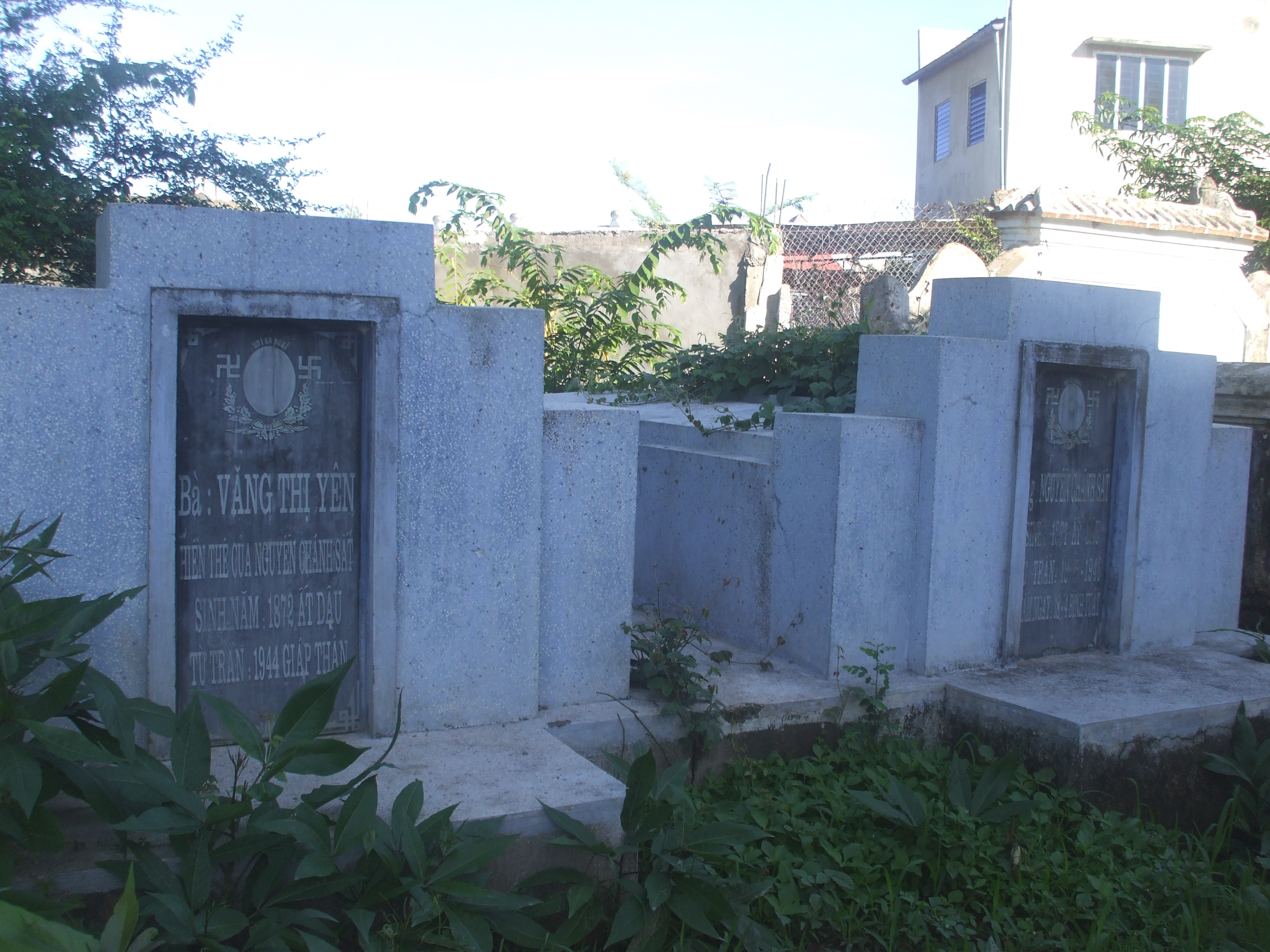 Mộ Nguyễn Chánh Sắt (phải) và vợ (trái) tại đường Chùa, Tân Châu, An Giang.